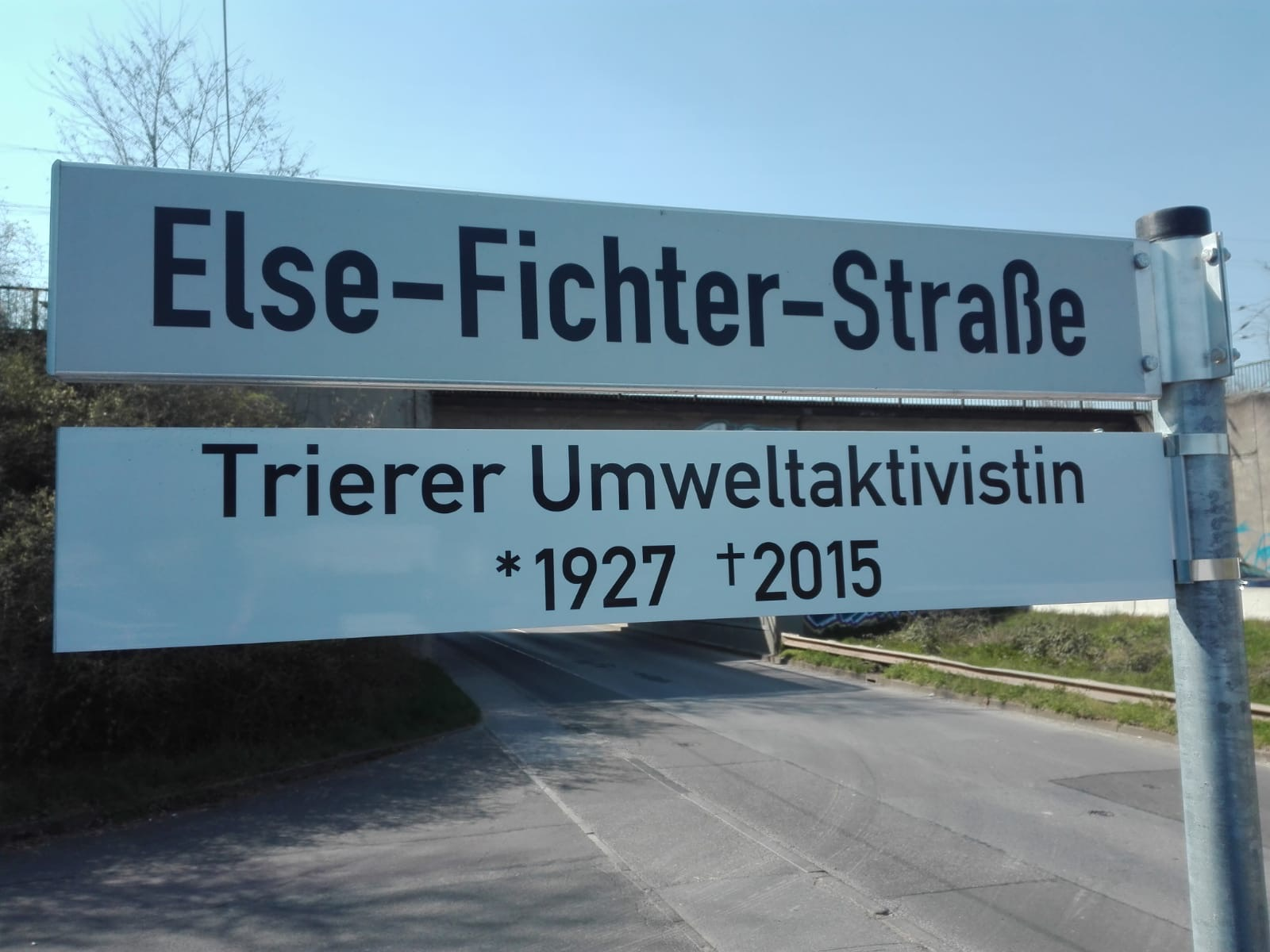 Die Fotografie zeigt die nach der Umweltaktivistin Else Fichter benannte Straße in Trier